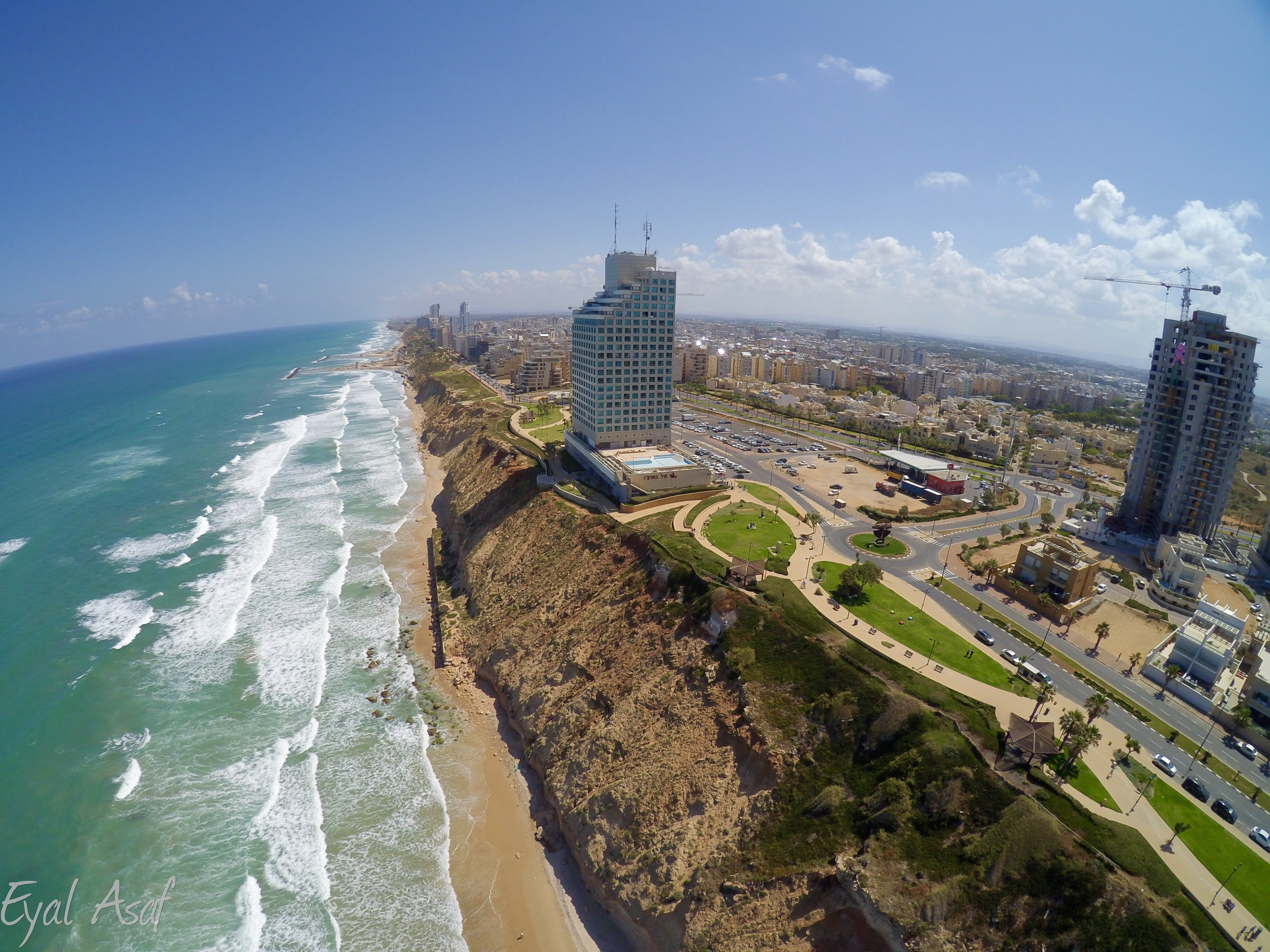 הטיילת בנתניה